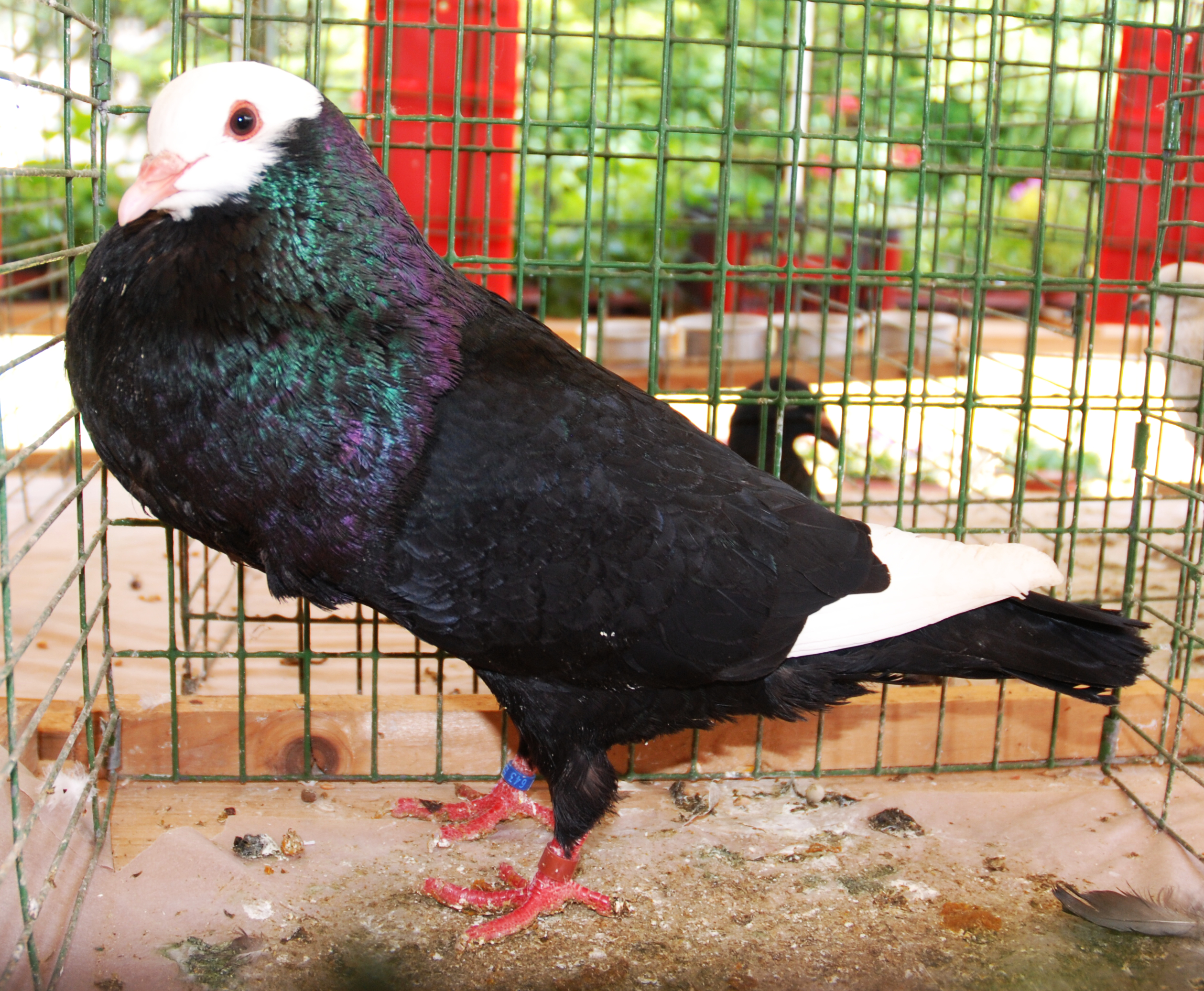 slovenský voláč černý